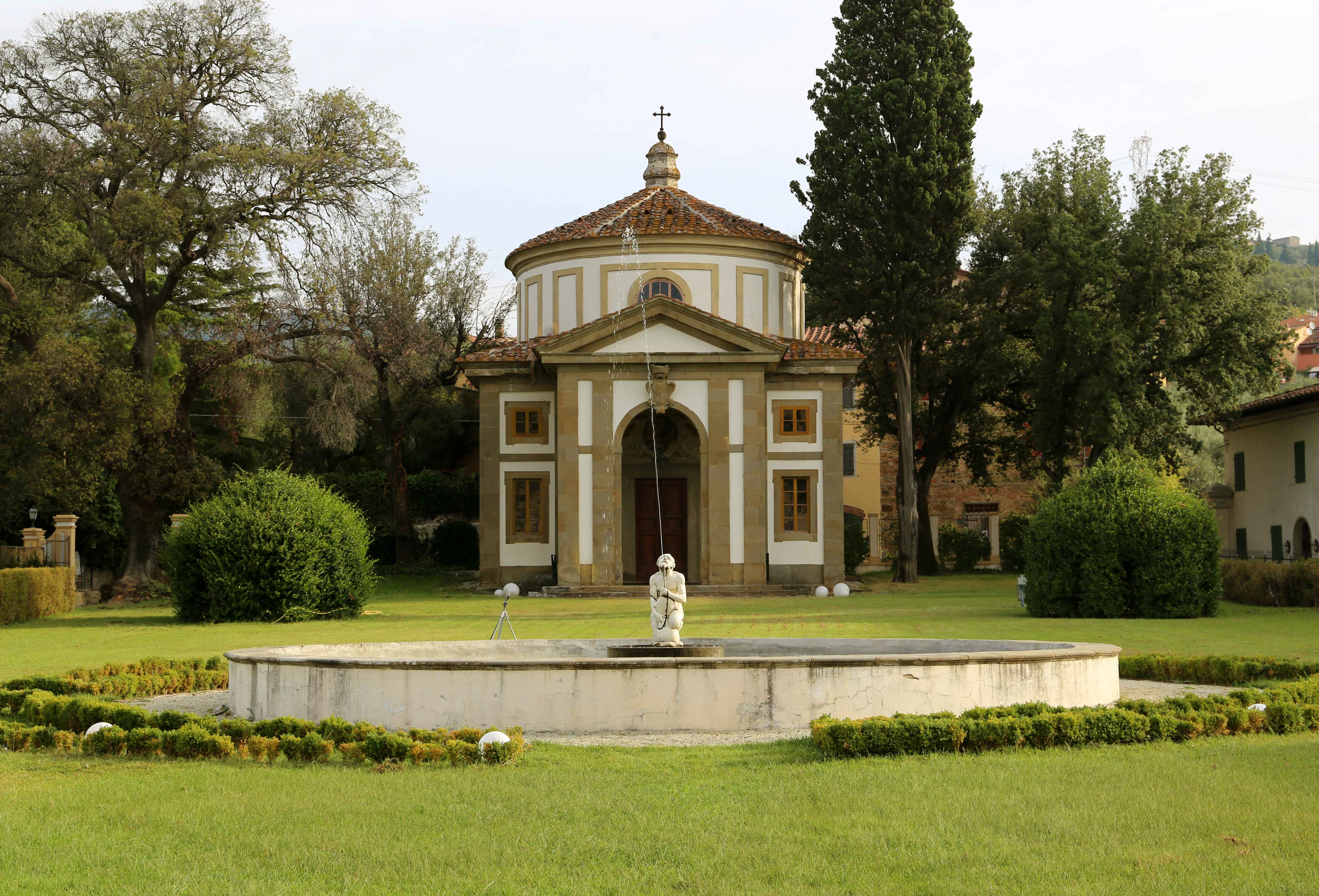 Villa Rospigliosi This is a photo of a monument which is part of cultural heritage of Italy.